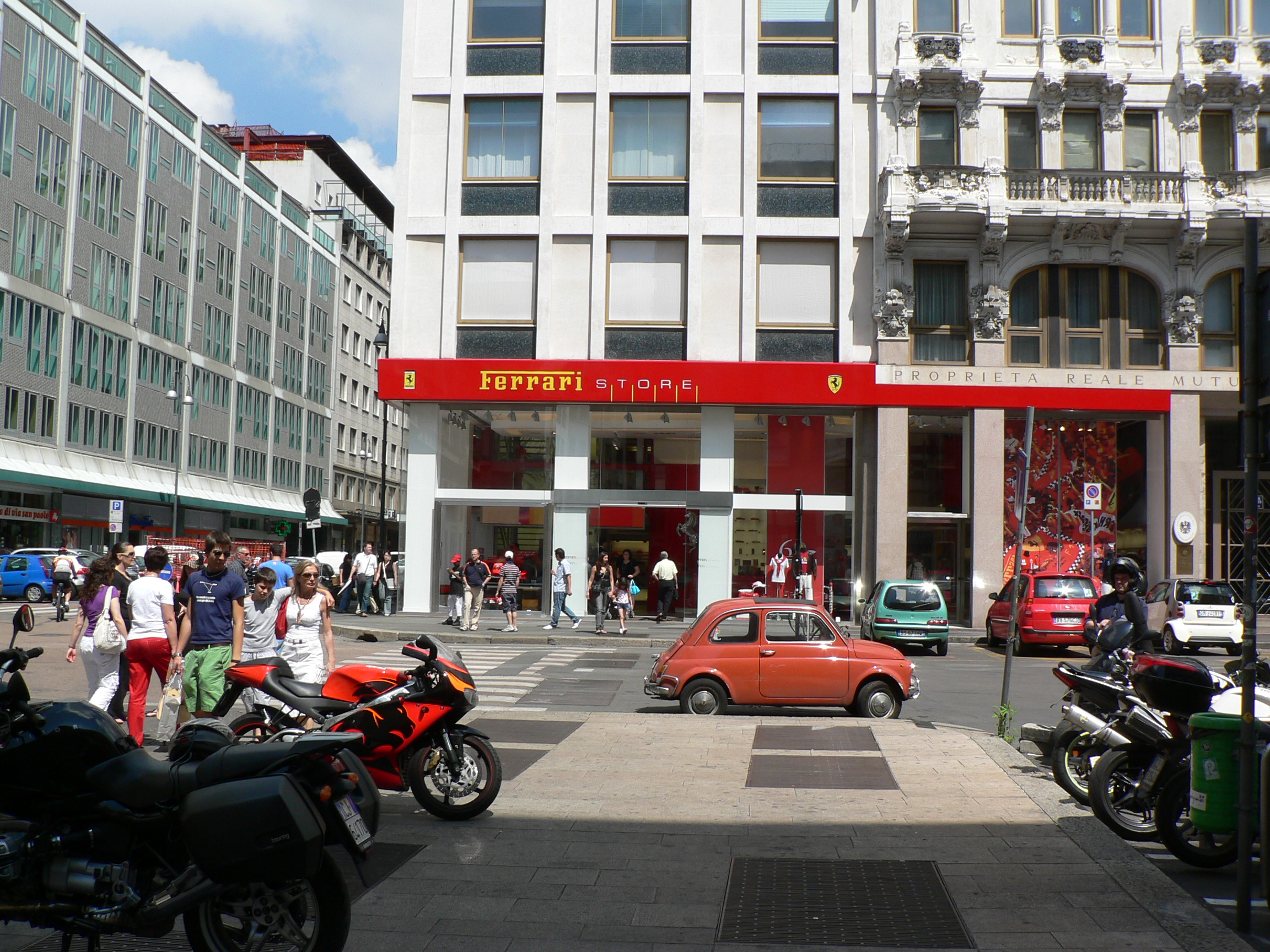 "Ferrari Store" in Piazzetta del Liberty a Milano.